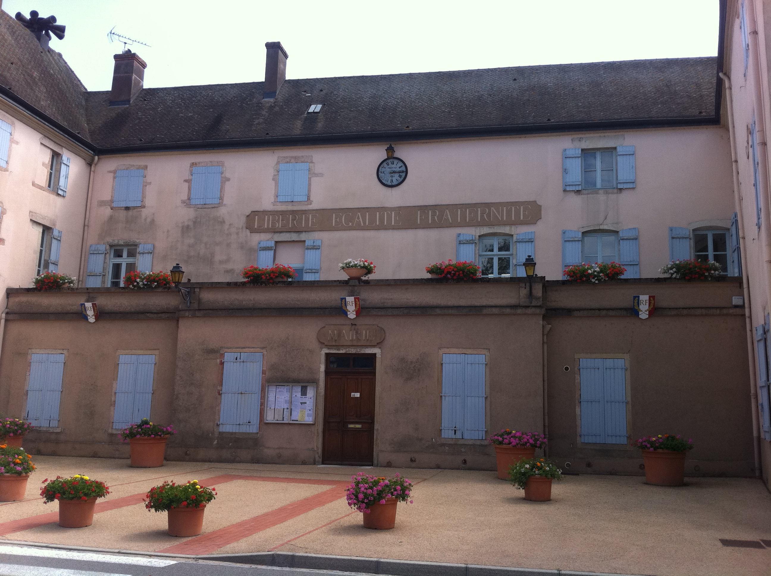 Mairie de Romenay, Saone-et-Loire, France, installée dans l'ancien château de l'évêque de Macon.